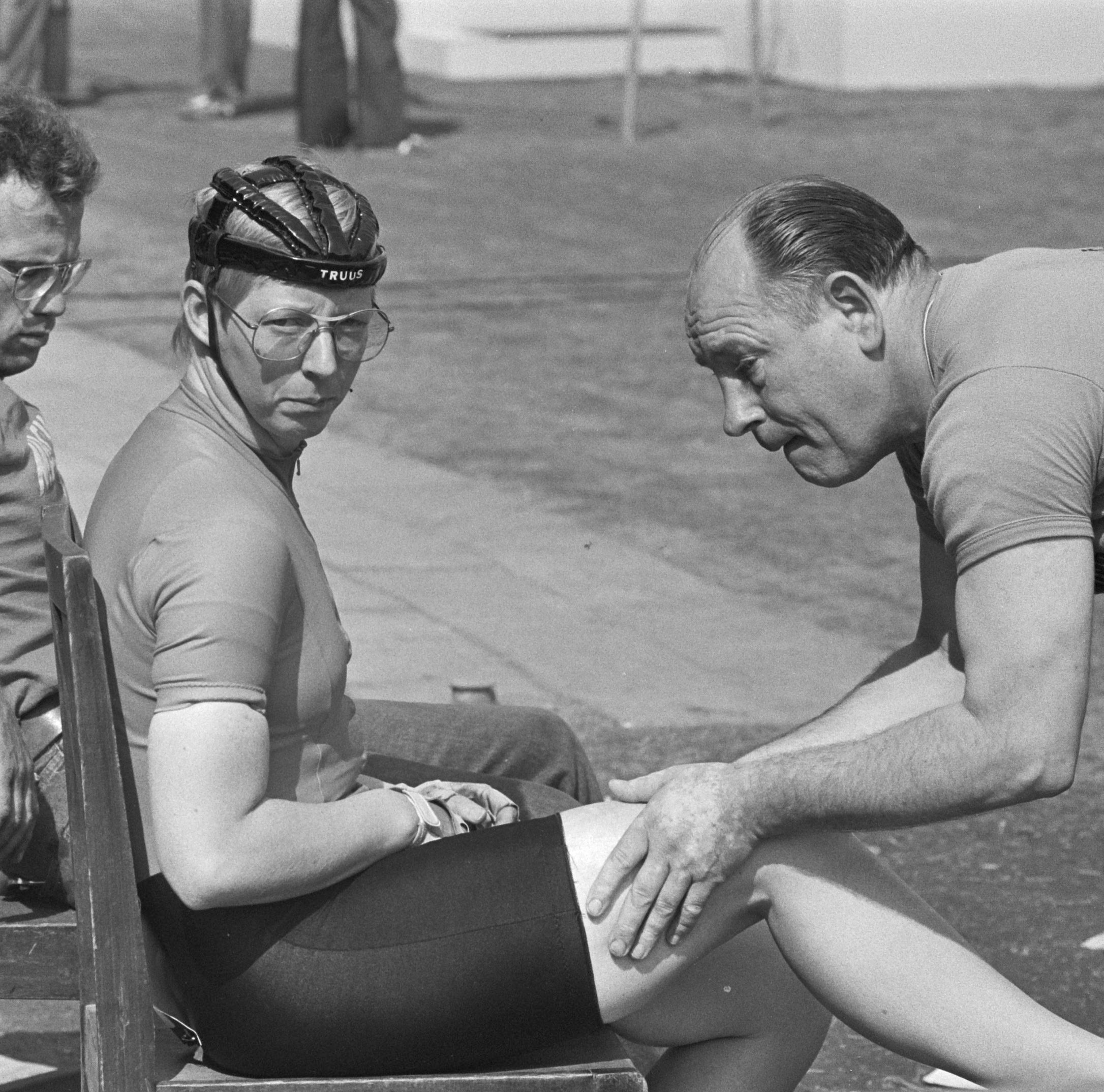 Wereldkampioenschappen Wielrennen 1979 in het Olympisch Stadion in Amsterdam. Truus van der Plaat wordt gemasseerd